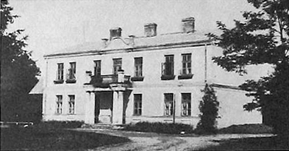 Беларуская (тарашкевіца): Рэчыца (Rečyca), сядзіба дэ Вірыёнаў (de Virion)